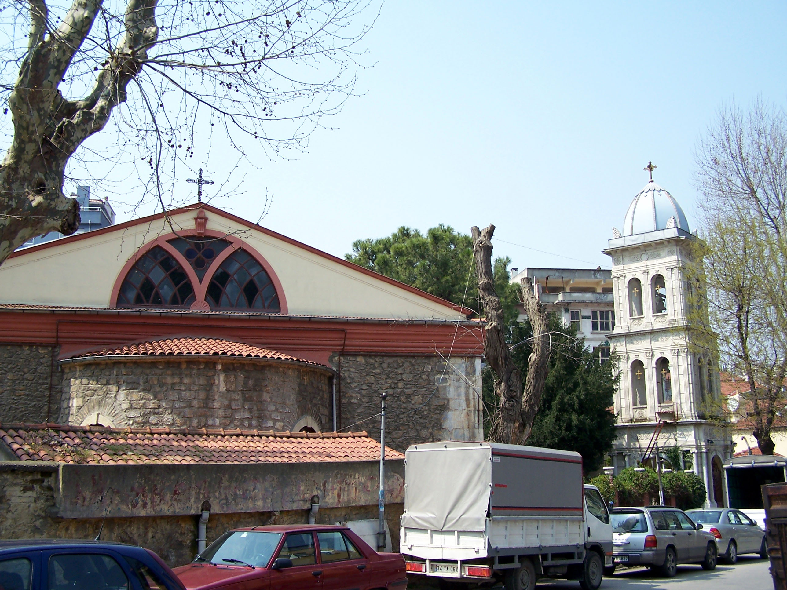 Greek Orthodox church in Kuzguncuk-Üsküdar